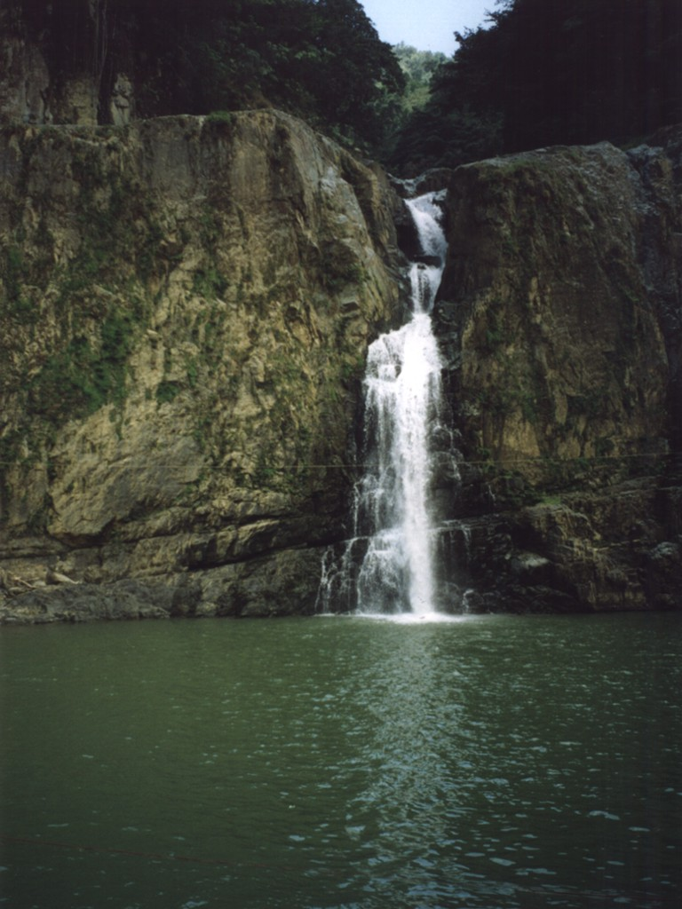 Salto de Jimenoa, Jarabacoa, Dominican Republic